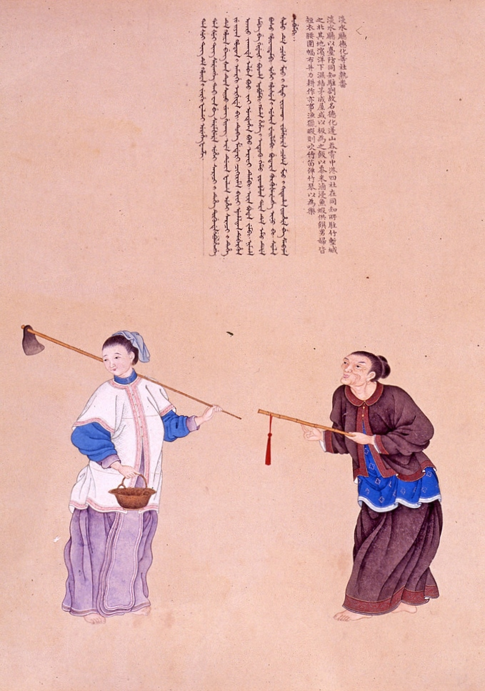 中文（香港）: 清 謝遂 職貢圖